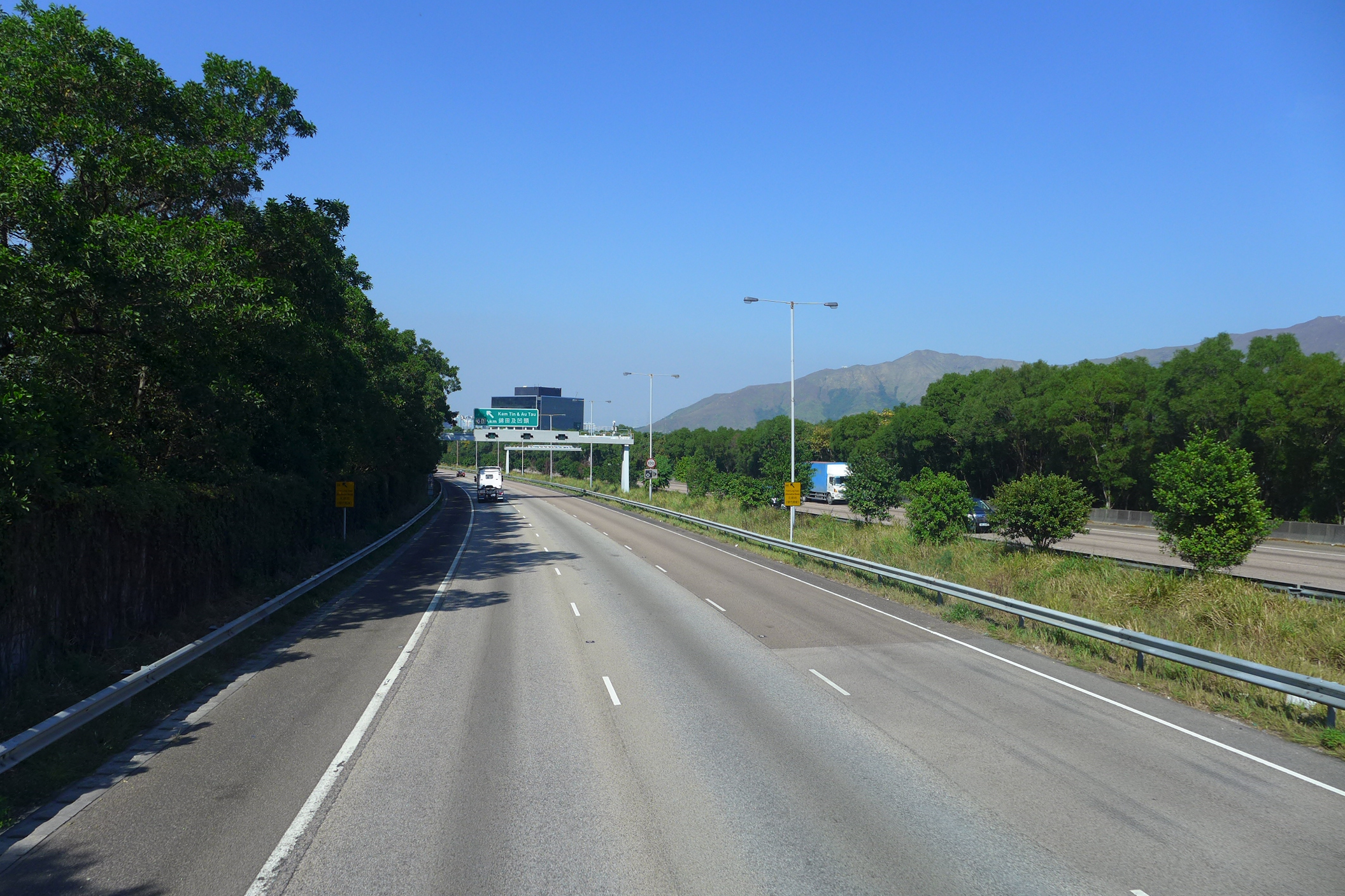 Tsing Long Highway